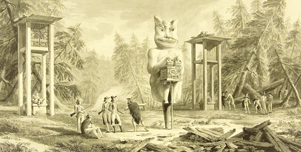 Ritual funerario con Tótem (en el centro)y grandes piras funerarias (a los lados) dibujado por Fernando Brambila durante la expedición Malaspina en el entorno de Mulgrave. La expedición recopiló las primeras descripciones etnográficas de los nativos de la zona Noroeste americana (costa oeste de Canada y Alaska.